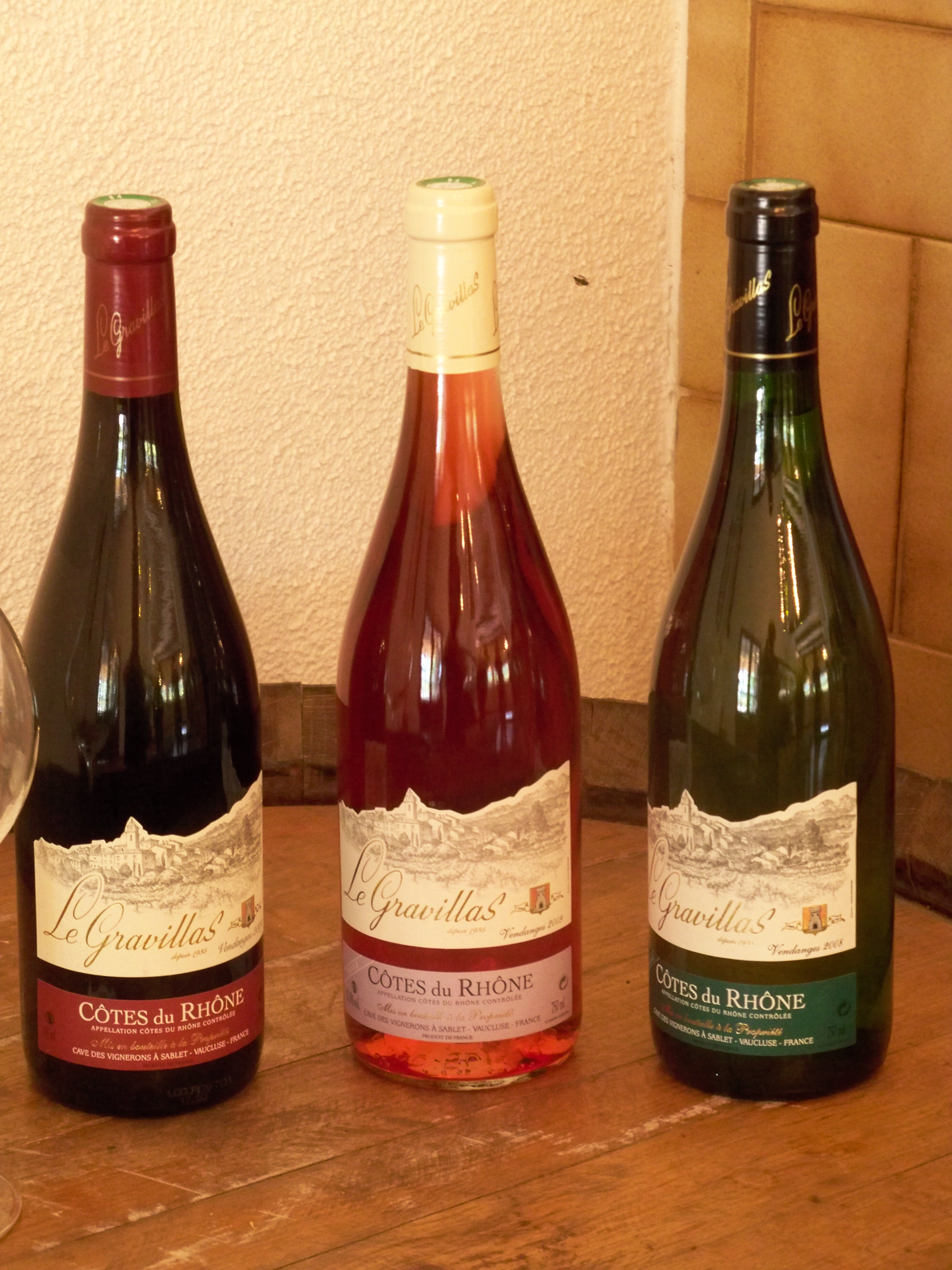 Blanc, Rouge et Rosé de Côtes du Rhône, Cave Le Gravillas, à Sablet, Vaucluse